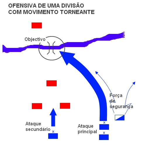 Forma de manobra ofensiva - Movimento torneante